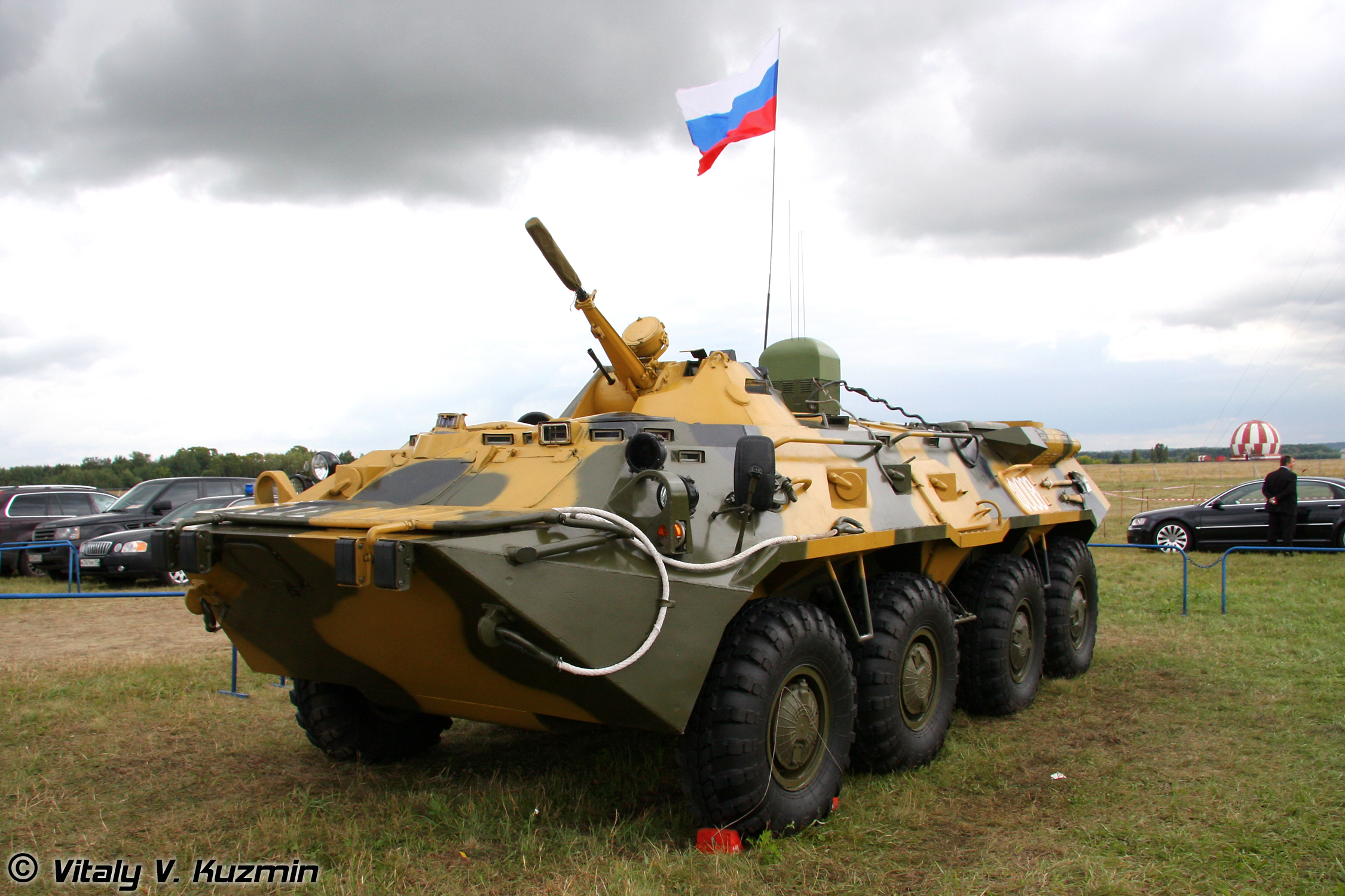 БТР-80 c устройством постановки шумовой помехи в широком диапазоне частот Пелена-6Б-Ф (BTR-80 with jammer Pelena-6B-F)